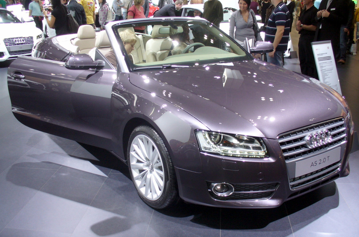 Audi A5 Cabrio